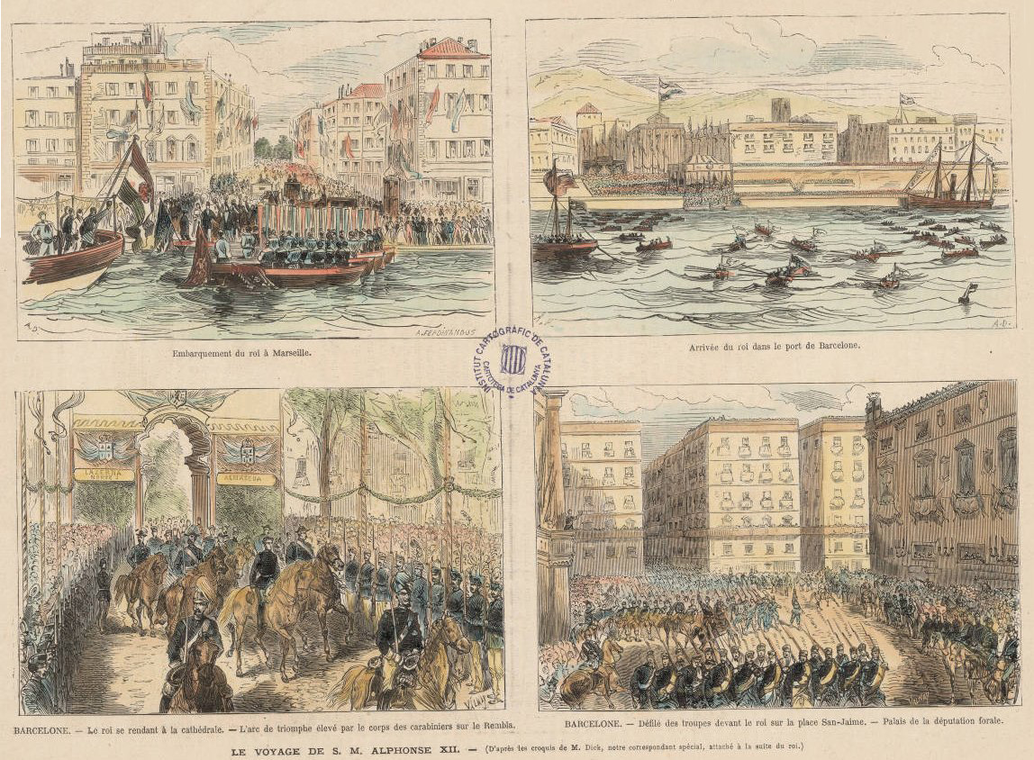 Llegada de Alfonso XII a Barcelona (1875).